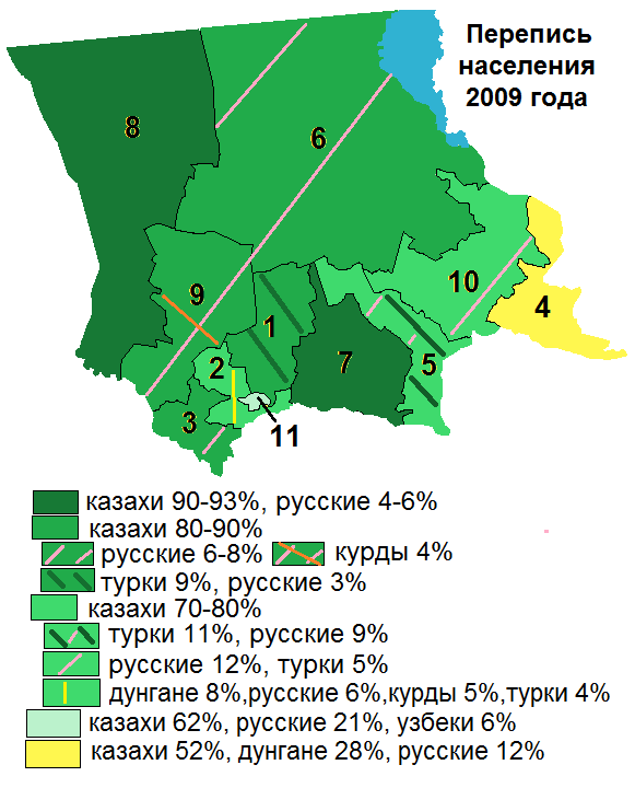 Этнический состав населения Жамбылской области по данным переписи 2009 года